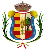 Escudo de Trigueros